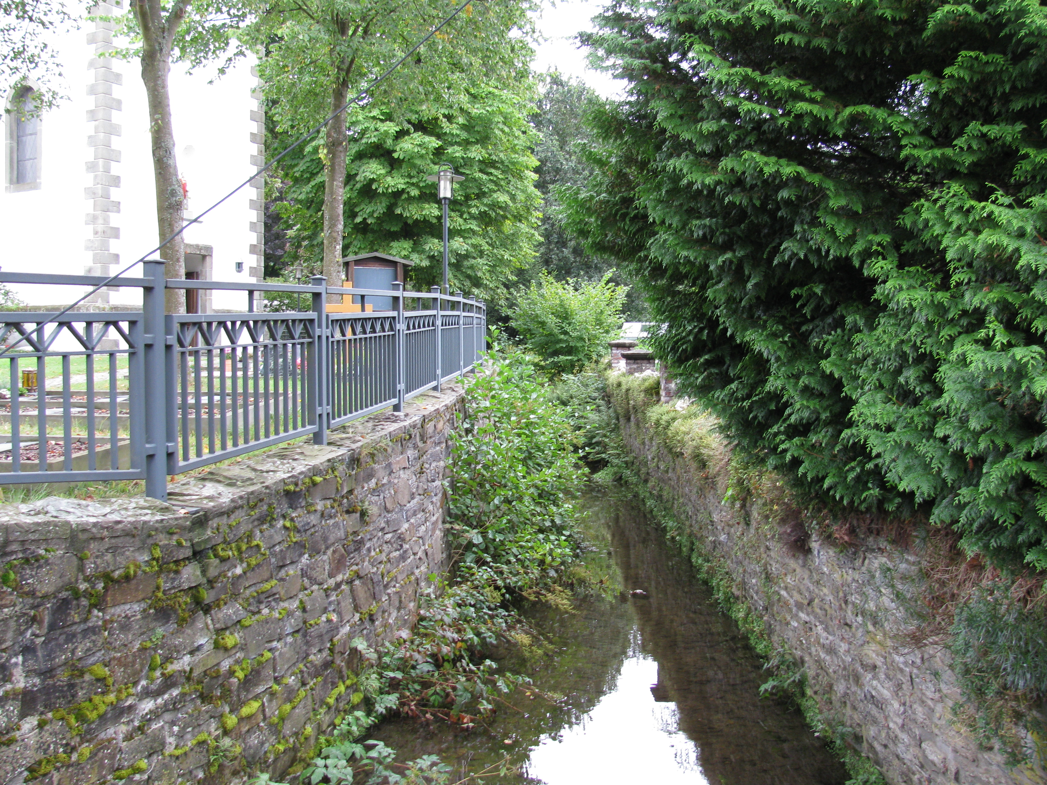 die Uentrop oberhalb der Straße Nierstenhof in Schmallenberg-Lenne